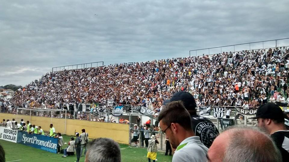 Cerca de 5 mil torcedores comemorando o acesso da Ponte Preta ao Campeonato Brasileiro, após derrotar o Bragantino por 2 a 0 em Bragança Paulista.